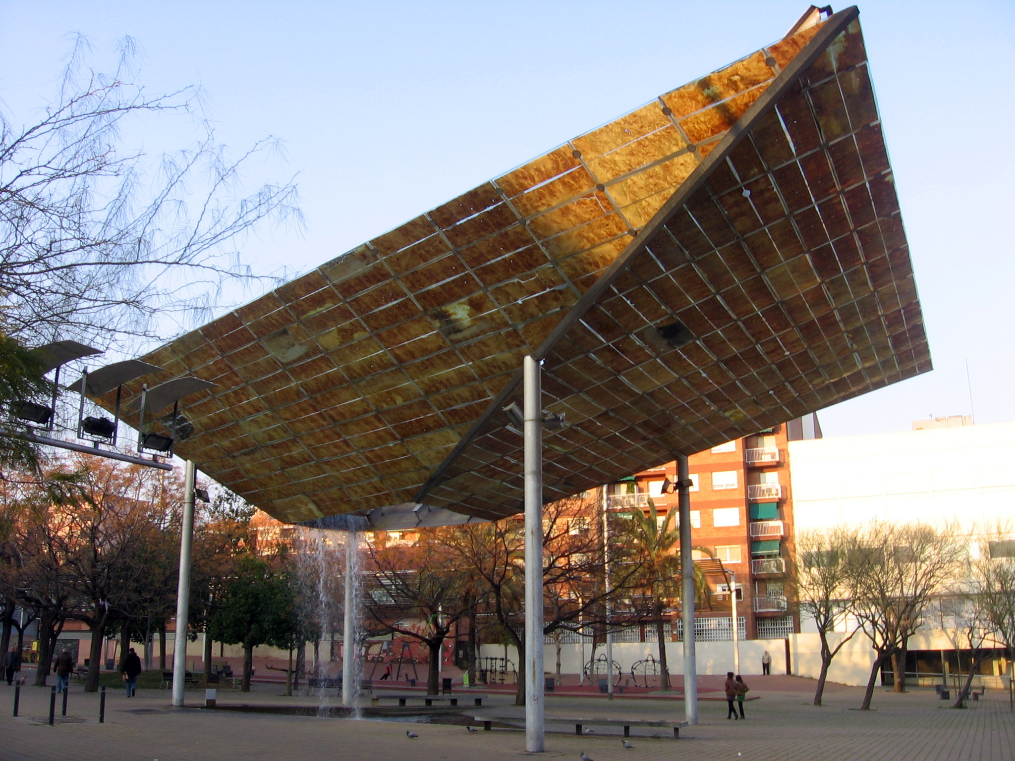 Fuente de la Harry Walker, Barcelona.